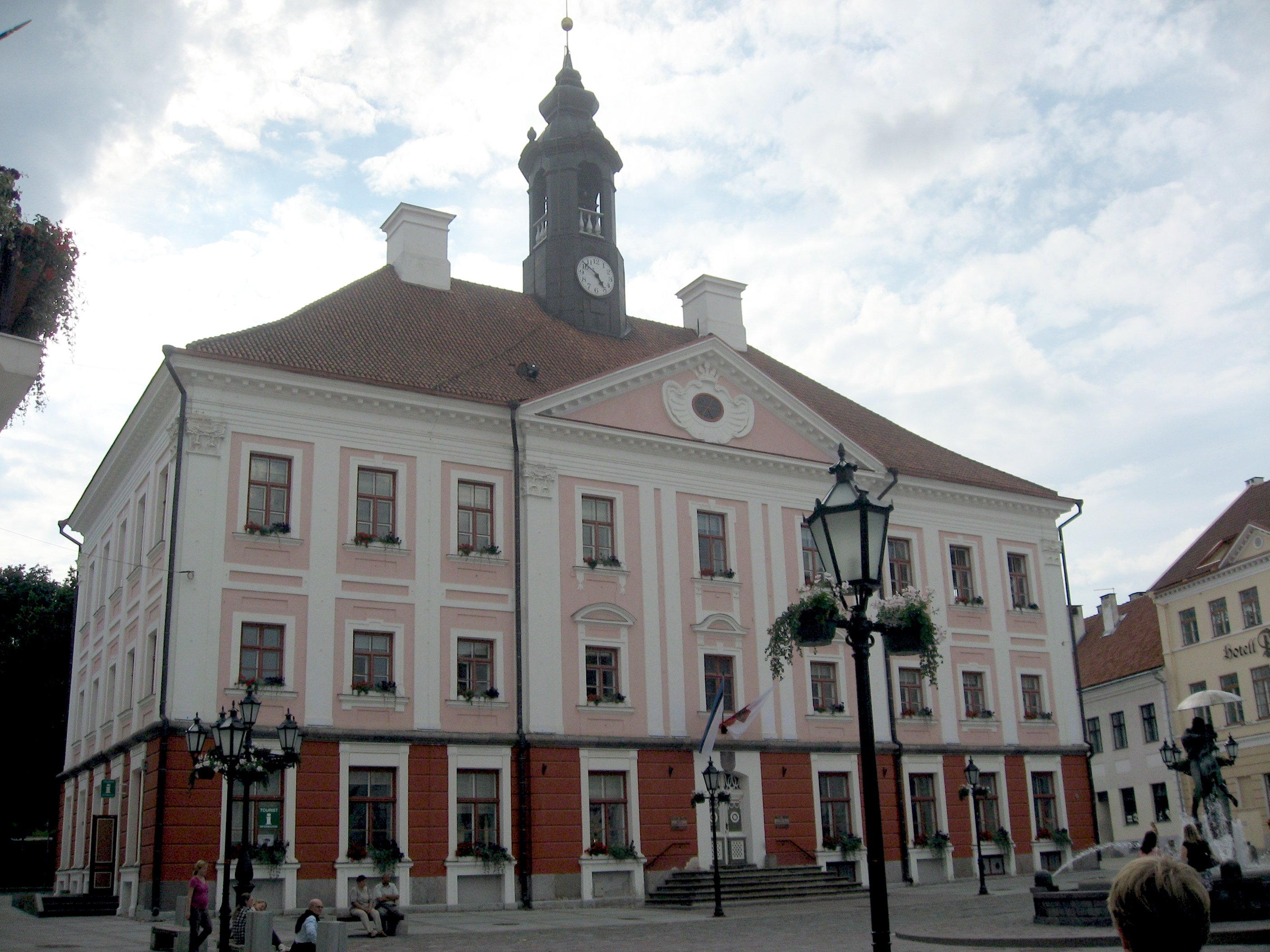 Tartu, radnice